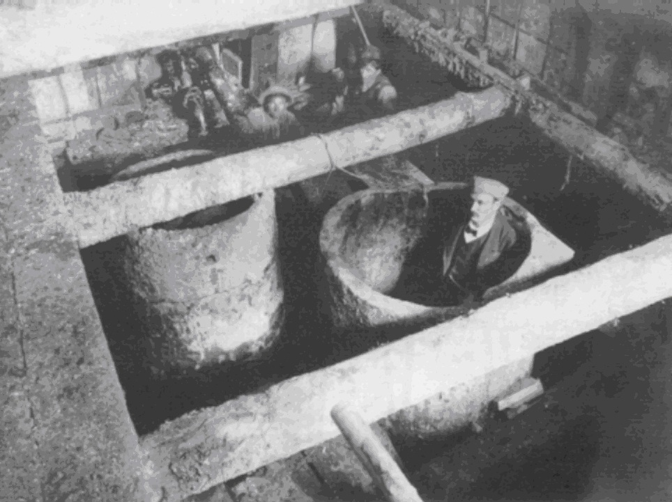 Die 1907 entdeckte und ausgegrabene Quellfassung der Heilquellen in St.Moritz (Schweiz) aus dem Jahre 1466 v. Chr.